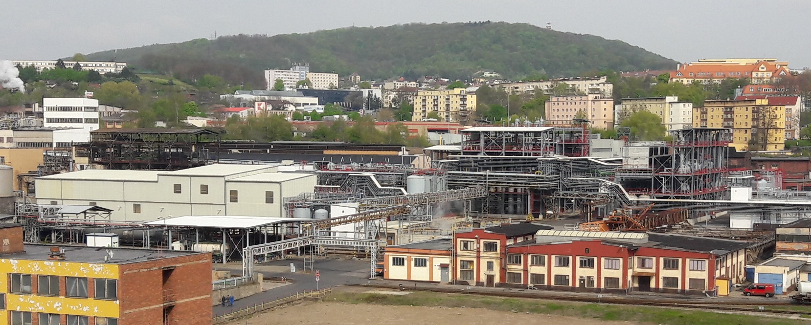 Spolchemie membrane electrolysis plant, commisioned in 2017.